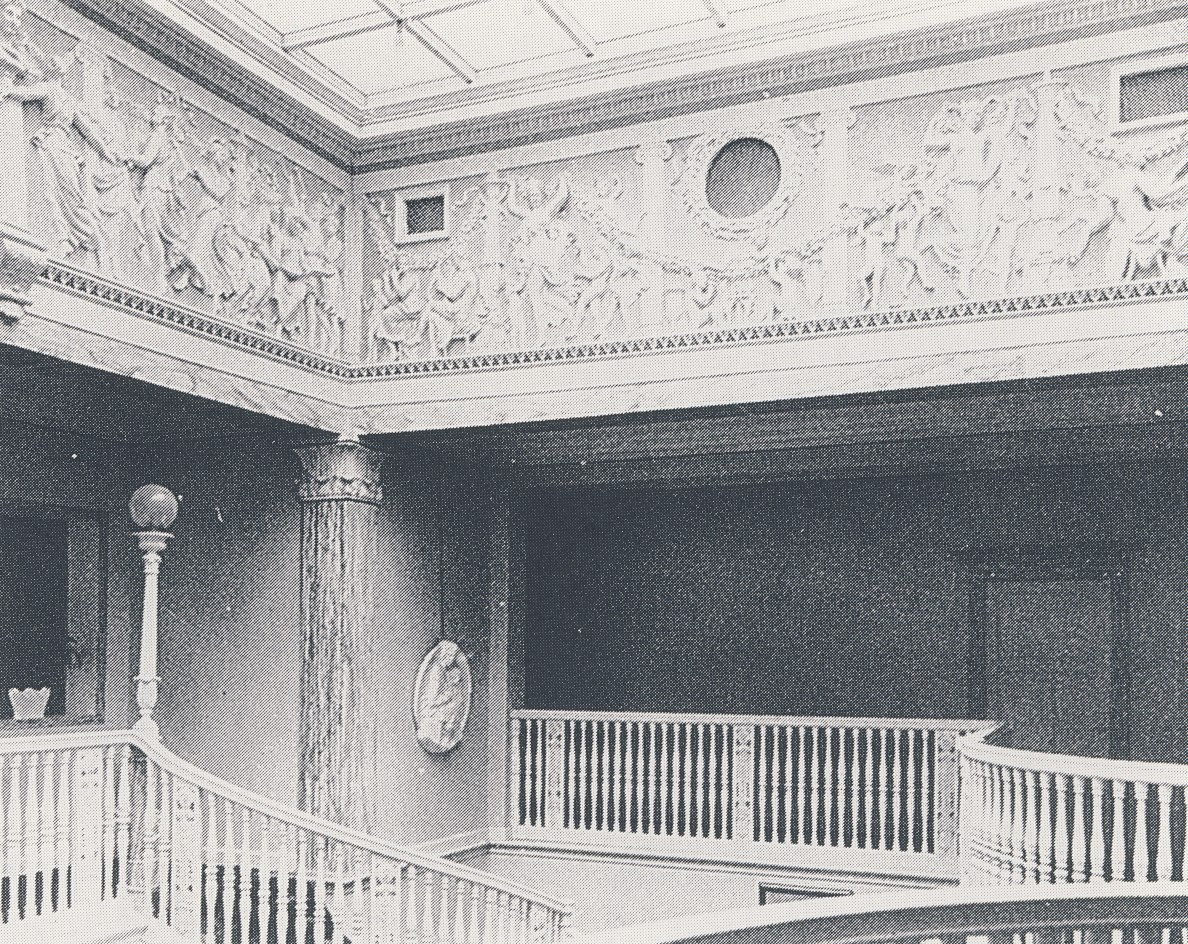 "Byströms villa" på Djurgården i Stockholm, interiör